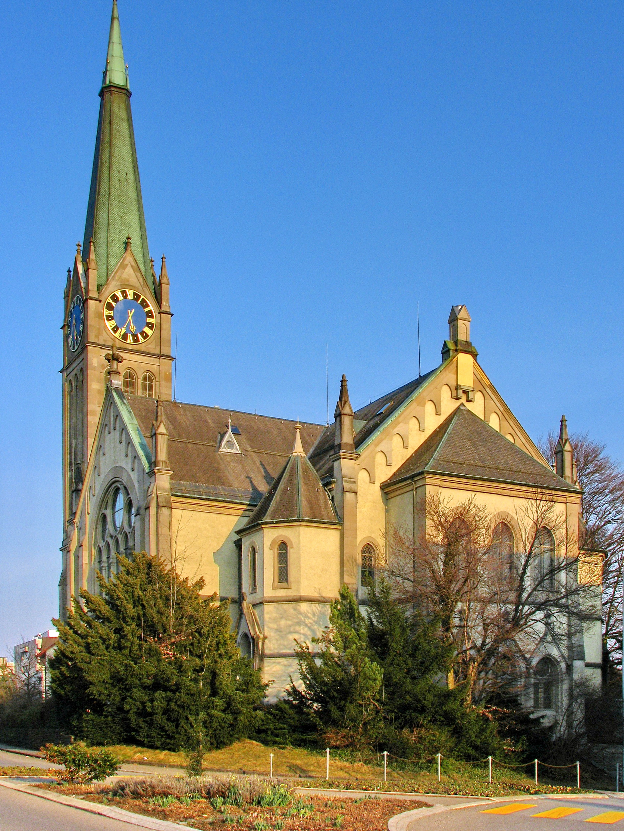 Reformierte Kirche in Wetzikon (Switzerland)